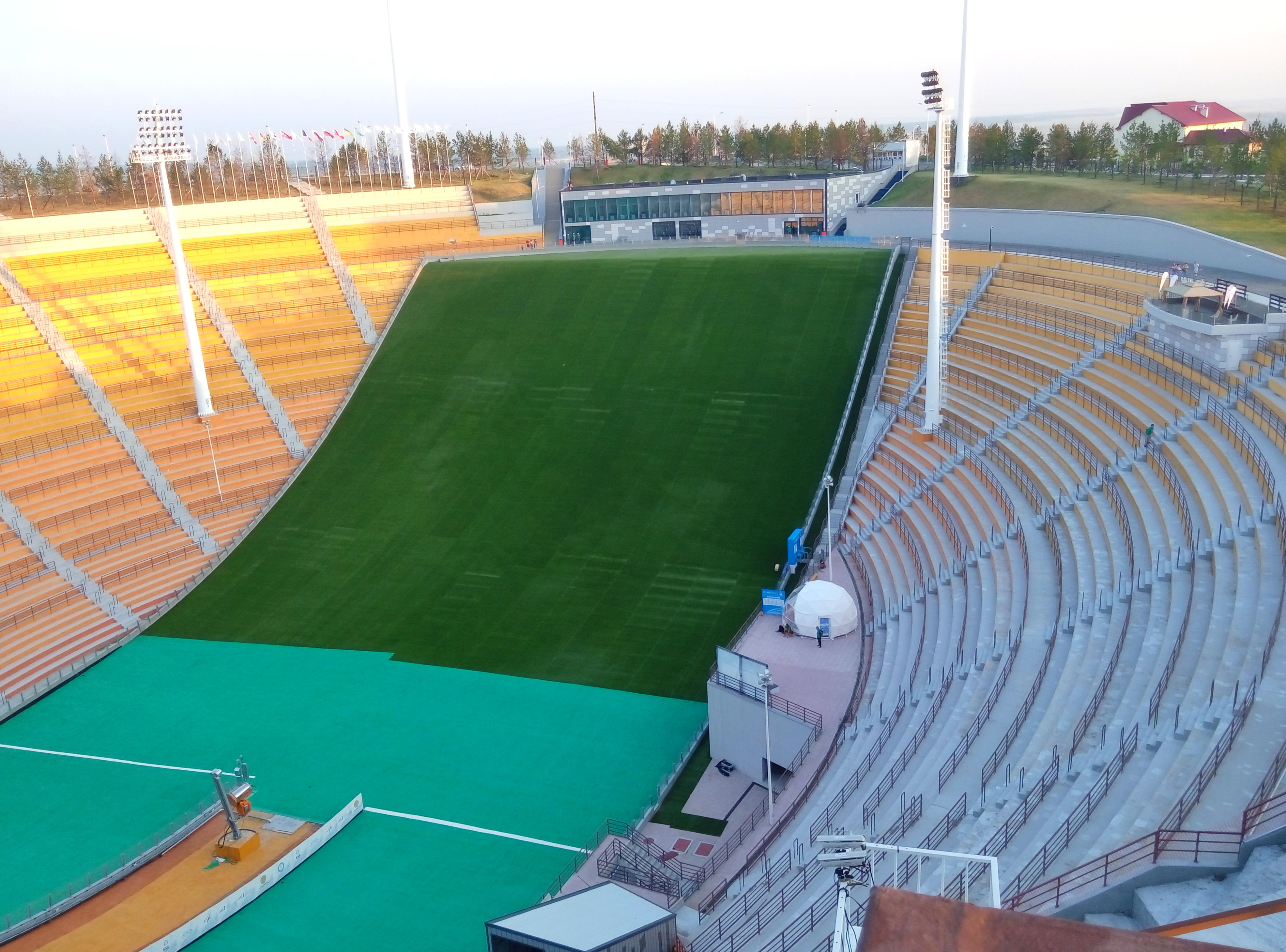 Комплекс трамплинов в Щучинске. Амфитеатр